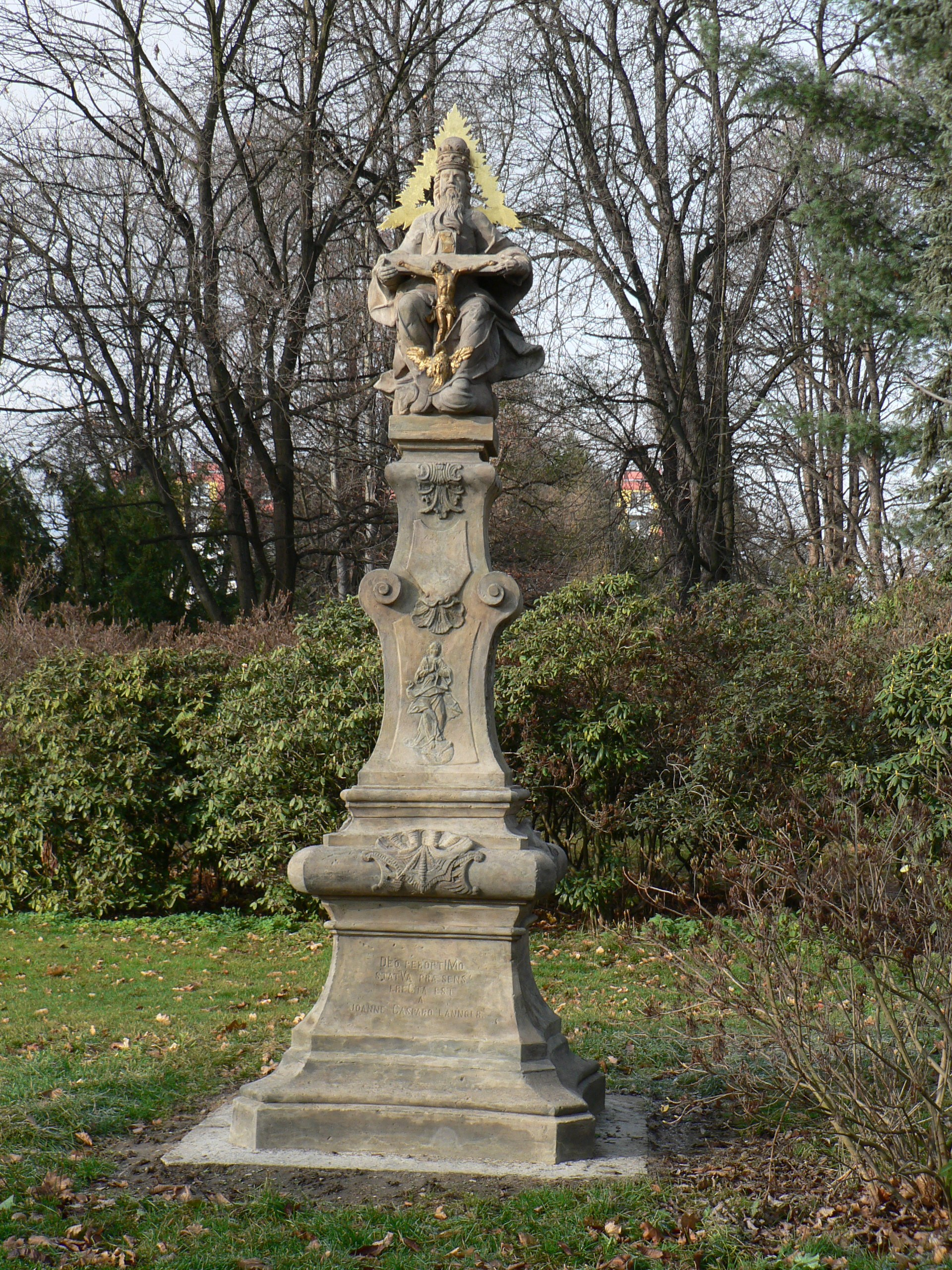 Sousoší Nejsvětější Trojice v Šumperku u sv. Barbory